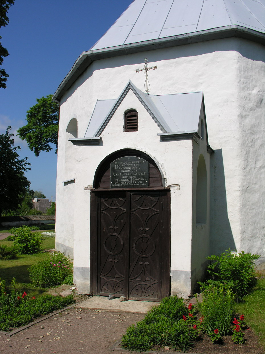 Žagarės regioninis parkas: Senosios Žagarės bažnyčia